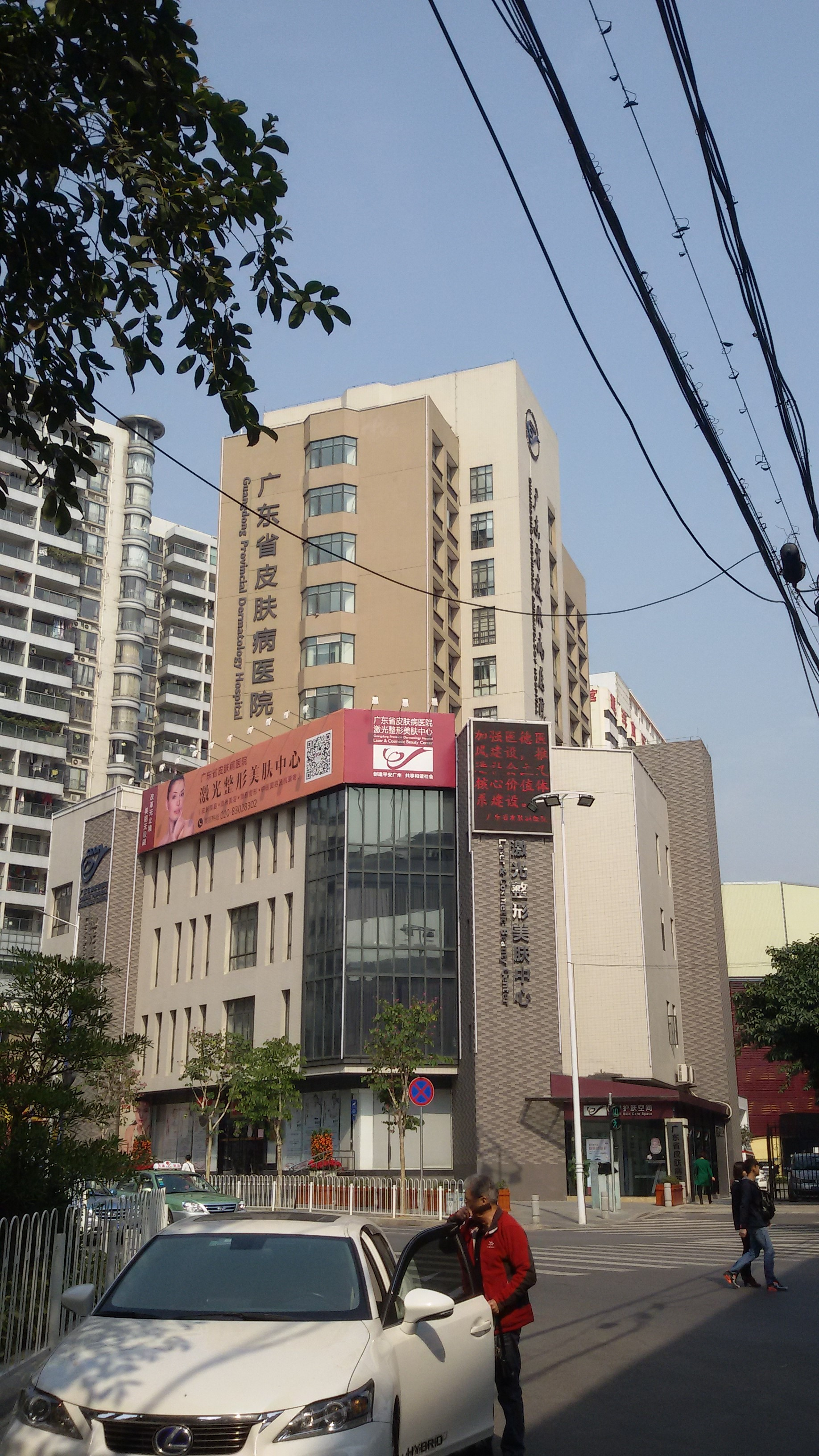 粵語: 广东省皮肤病医院